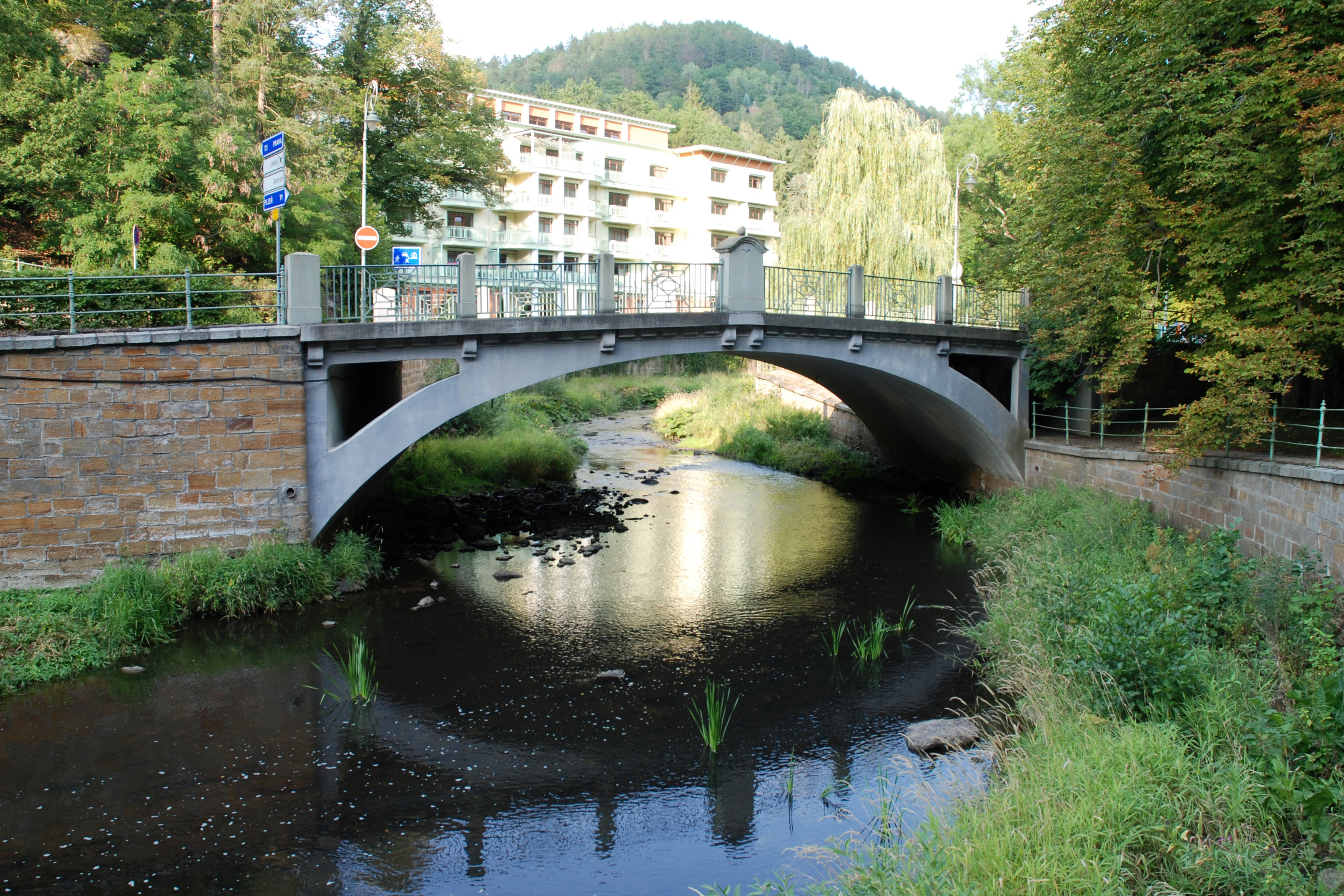 Karlův most přes řeku Teplá v Karlových Varech